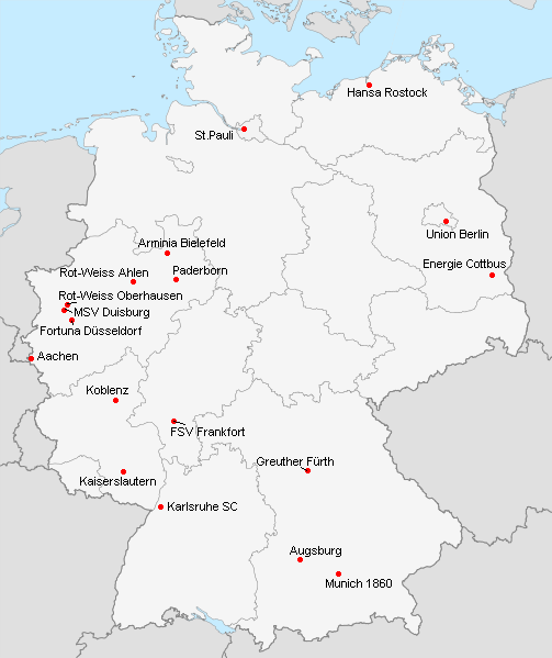 Répartition des clubs en 2.Bundesliga 2009-2010.